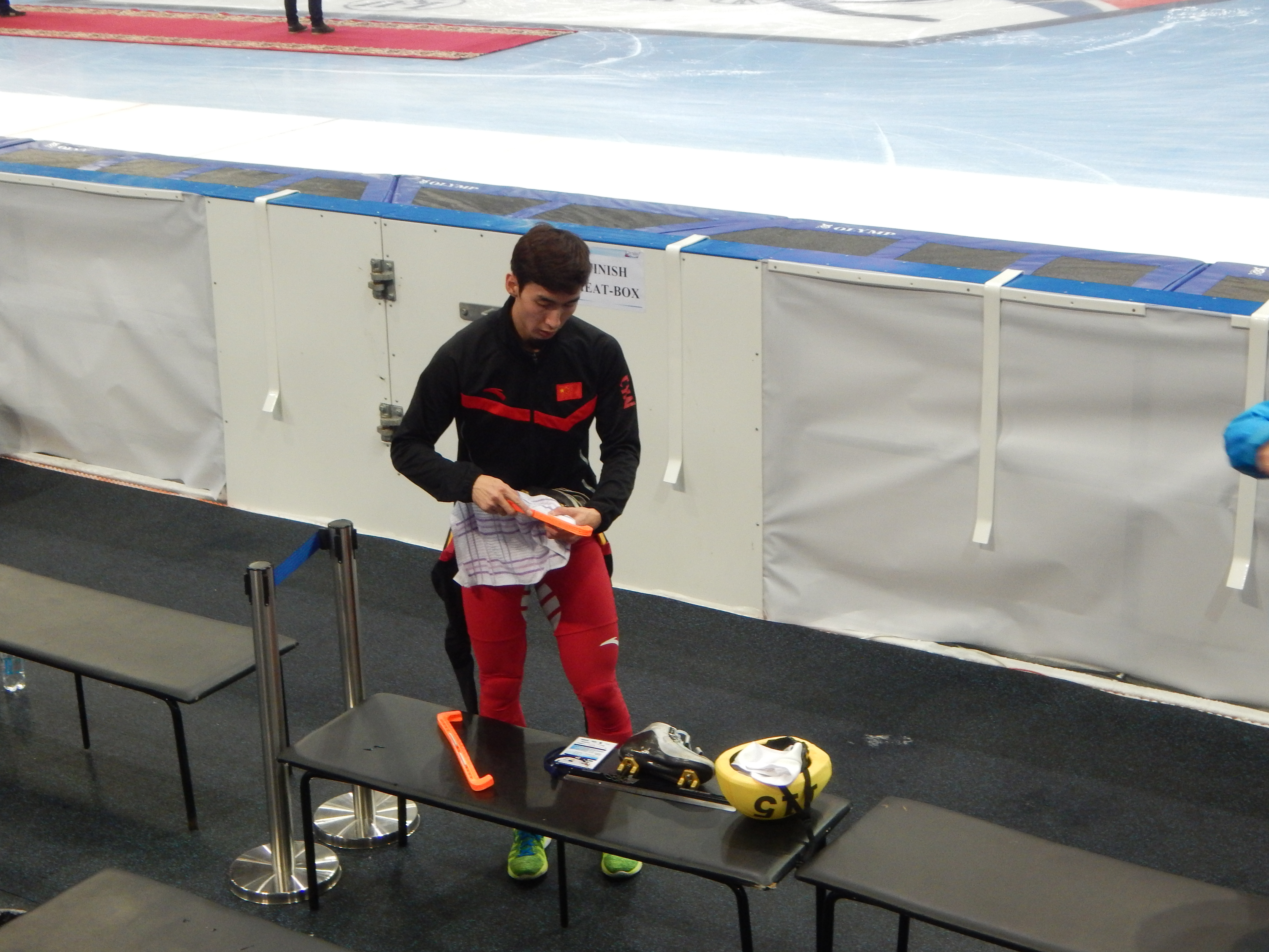 Чемпионат мира по шорт-треку 2015 в Москве Эстафета. Мужчины. Полуфинал. 2 забег